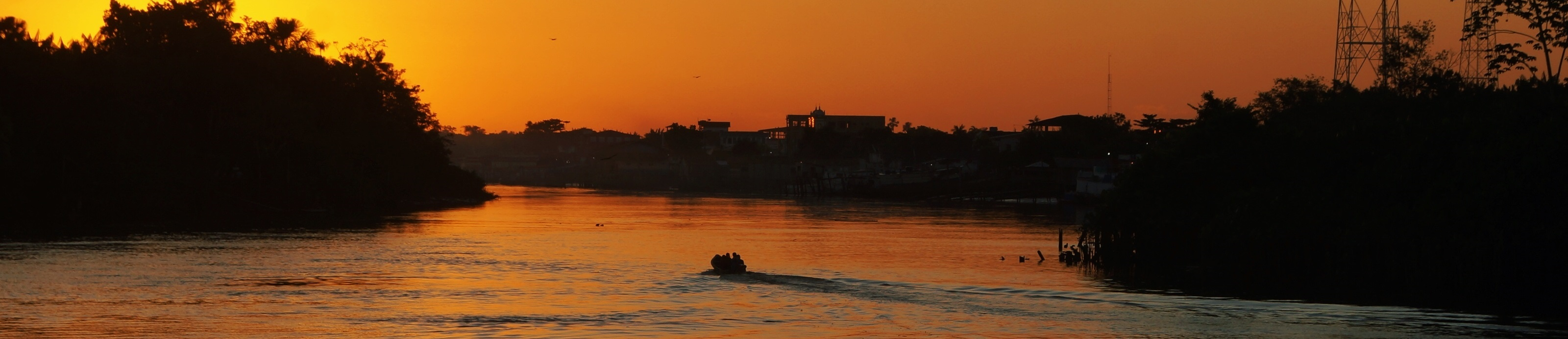 Por do sol no Miri